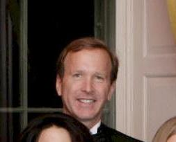 Chân dung của Neil Bush.